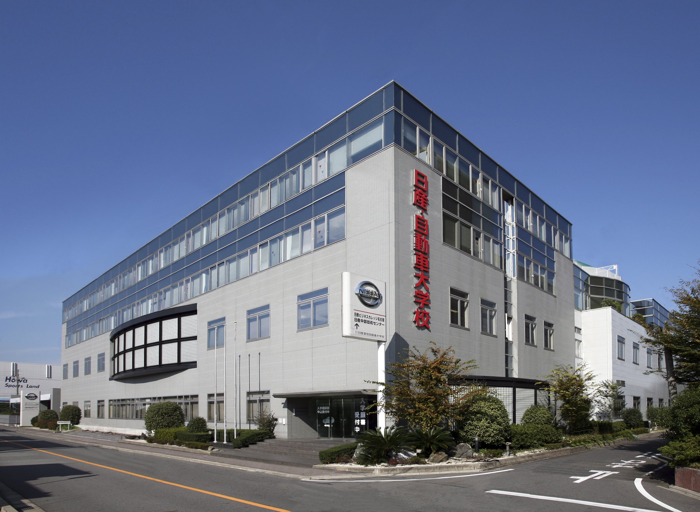 日産愛知自動車大学校